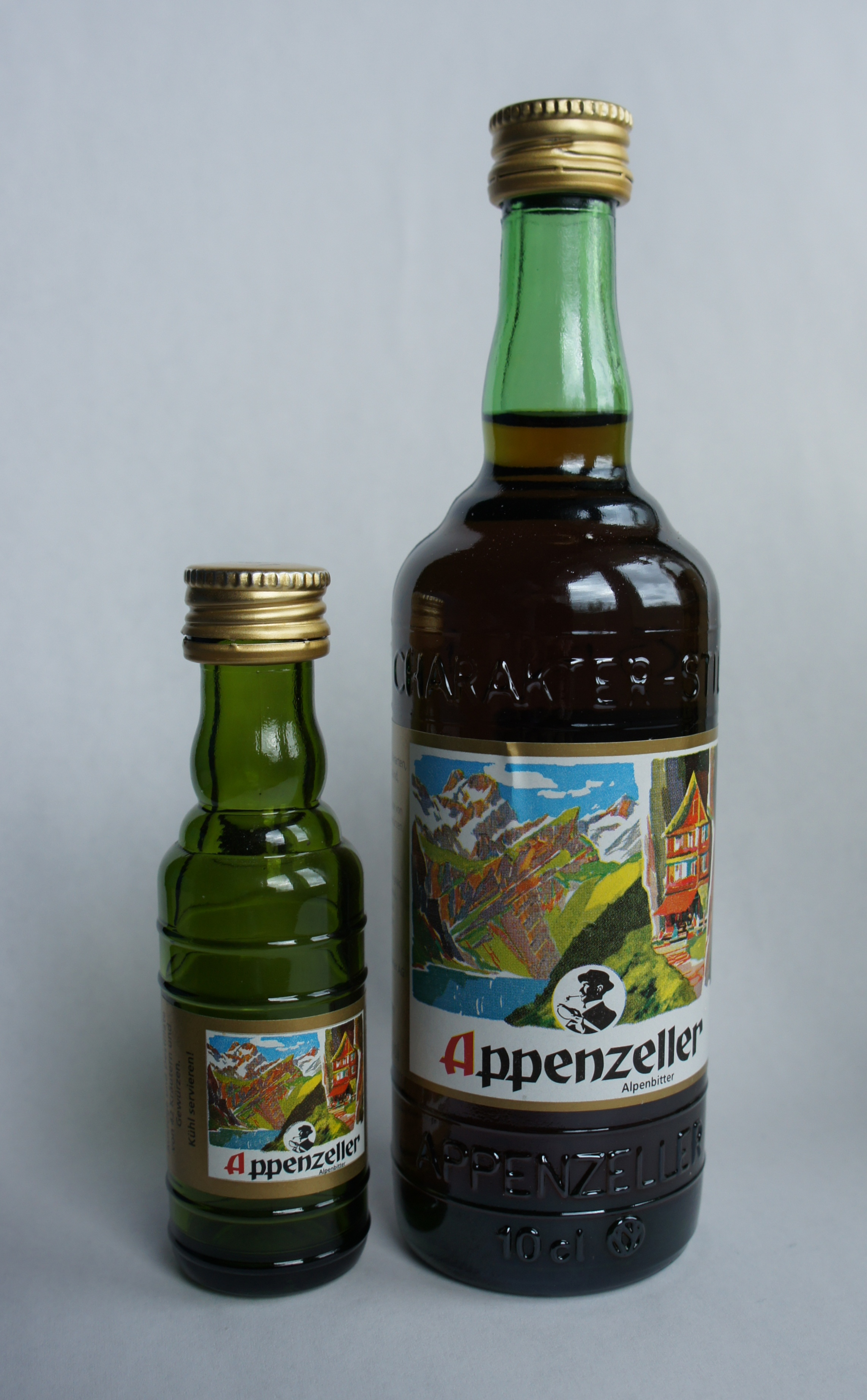 Ein 2-cl (leer) und ein 10-cl Fläschchen Appenzeller Alpenbitter.